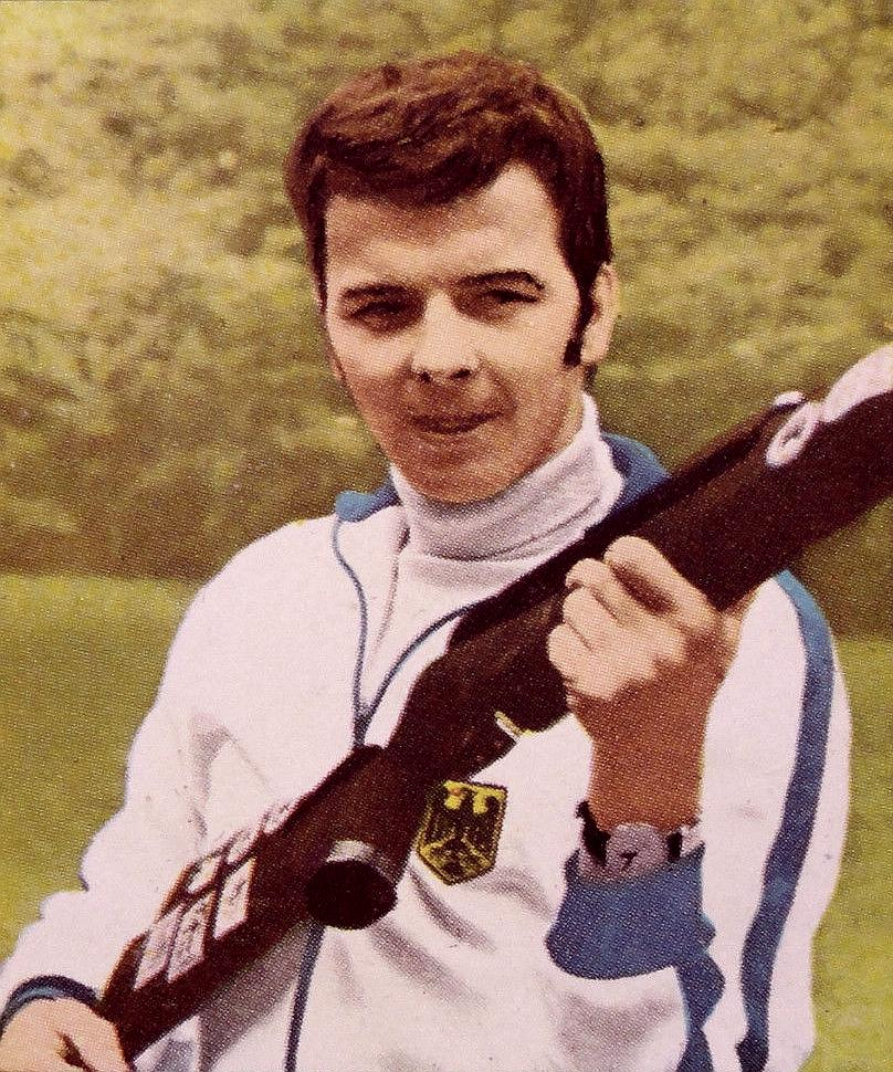 MUNCHEN 72-Figurina-Stickers-Panini-N° 168-KUSTERMANN recuperata